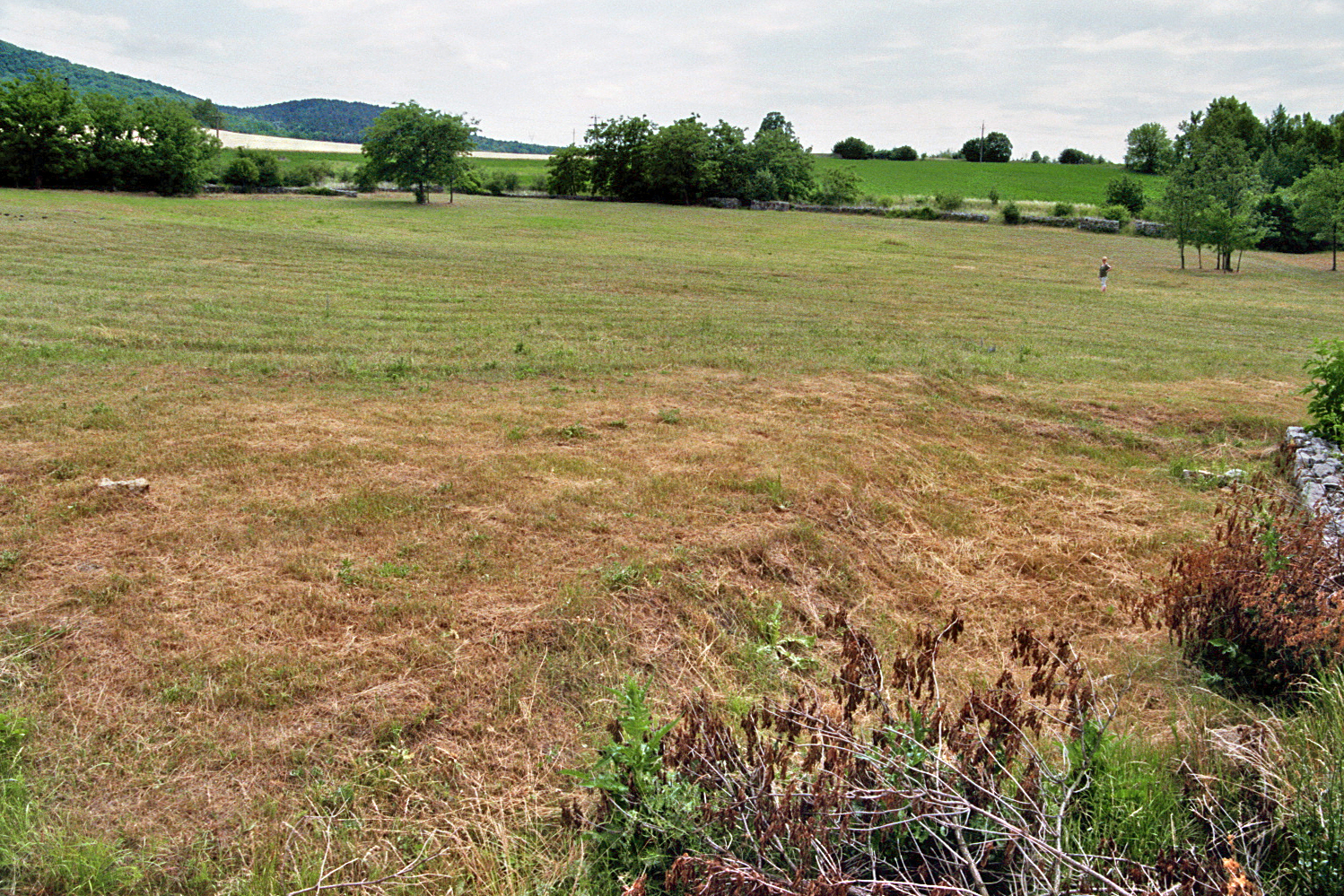 Kastell Tokod, Ungarn: Blick vom Horreum in die südliche Kastellecke. This is a photo of a monument in Hungary, Identifier: 6487